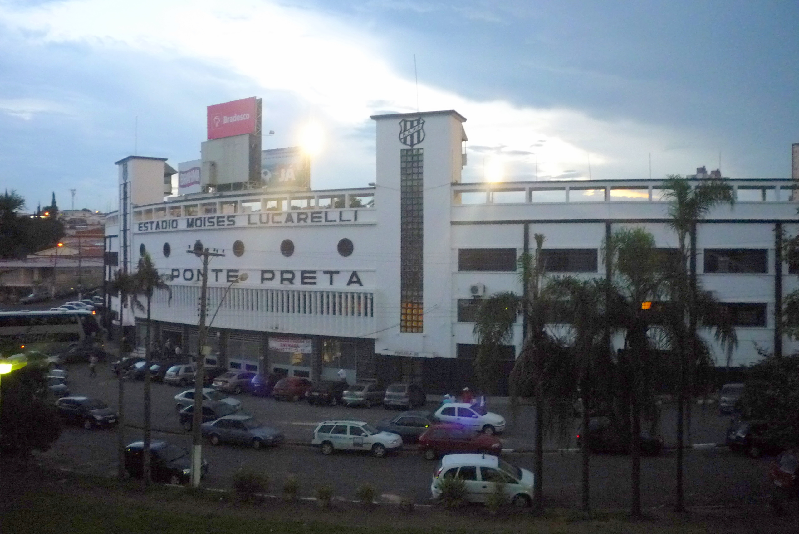 Estádio Moisés Lucarelli - Ponte Preta